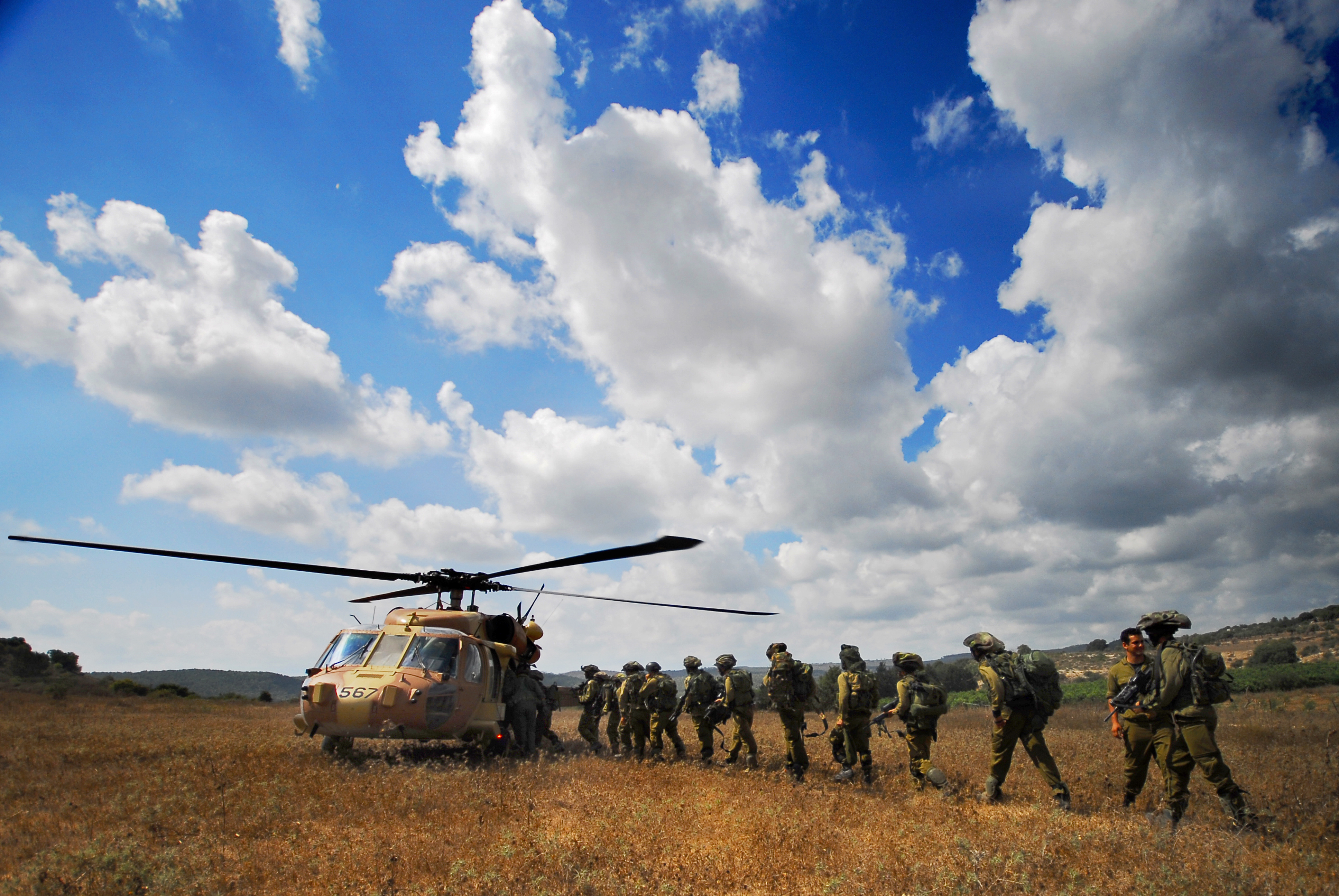 July 28, 2008. Soldiers from the Golani Brigade take part in a military exercise with IAF forces in the Golan Heights. Pictured: Soldiers filing into a “Black Hawk” helicopter in order to practice being flown to different areas. Featured as "Photo of the Day" on November 24, 2010. Photo by Michael Shvadron, IDF Spokesperson's Film Unit. חיילי חטיבת גולני לקחו חלק באימון משולב עם כוחות חיל אוויר ברמת הגולן. בתמונה: חיילים נכנסים למסוק קרב מדגם "ינשוף" במטרה לתרגל הטסה לאזורים שונים. פורסמה כ"תמונת היום" בתאריך נובמבר 24, 2010. צילום על ידי מיכאל שבדרון, יחידת ההסרטה, דובר צה"ל.